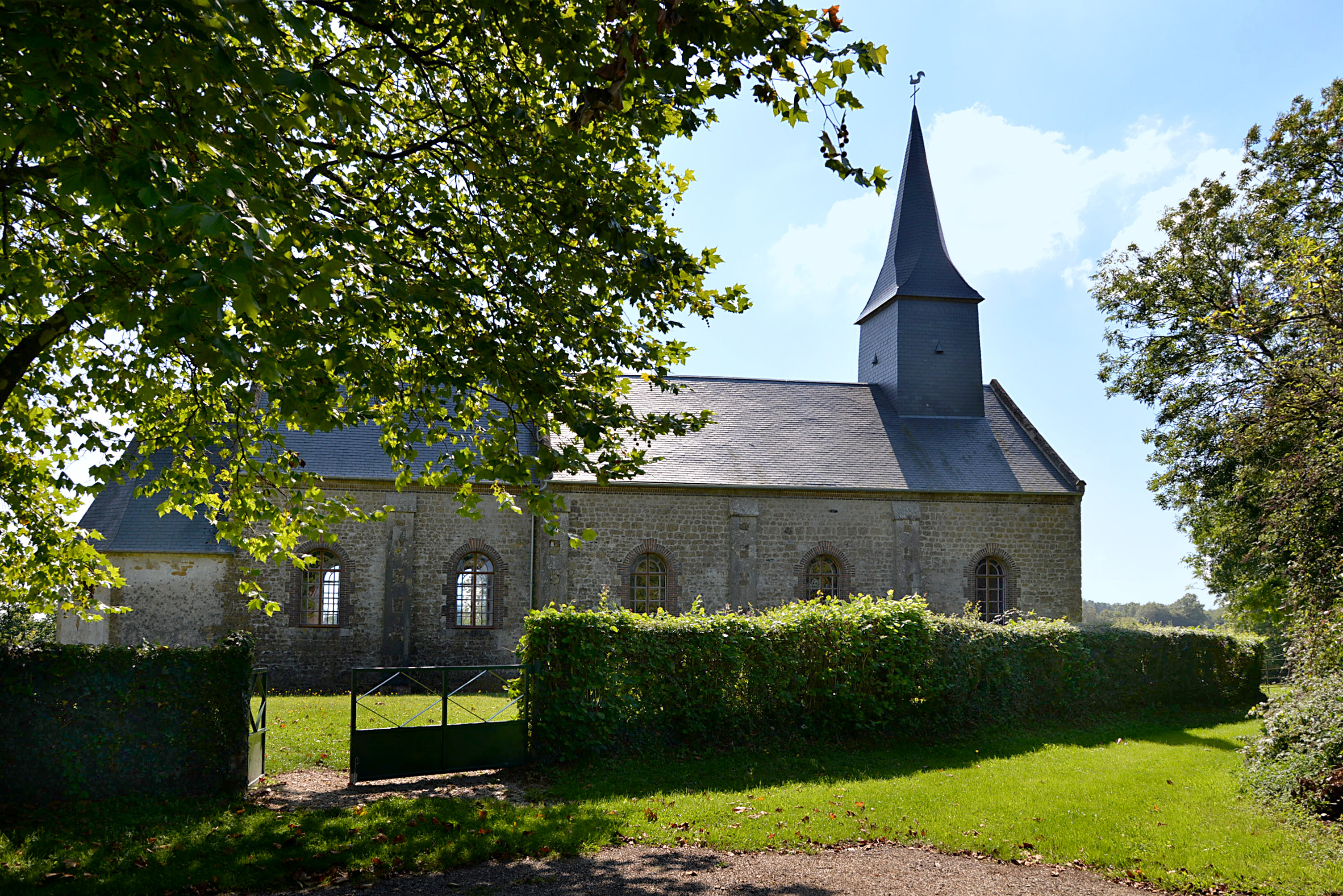 Champ-Haut (Orne)